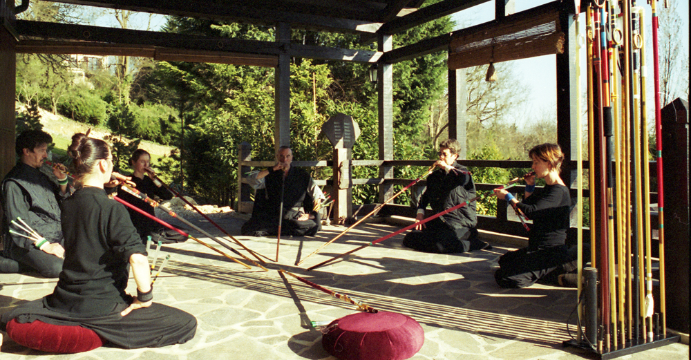 Zen-Dojo-Sarbacana (Paris) (Musique des sarbacanes Sarbacana)